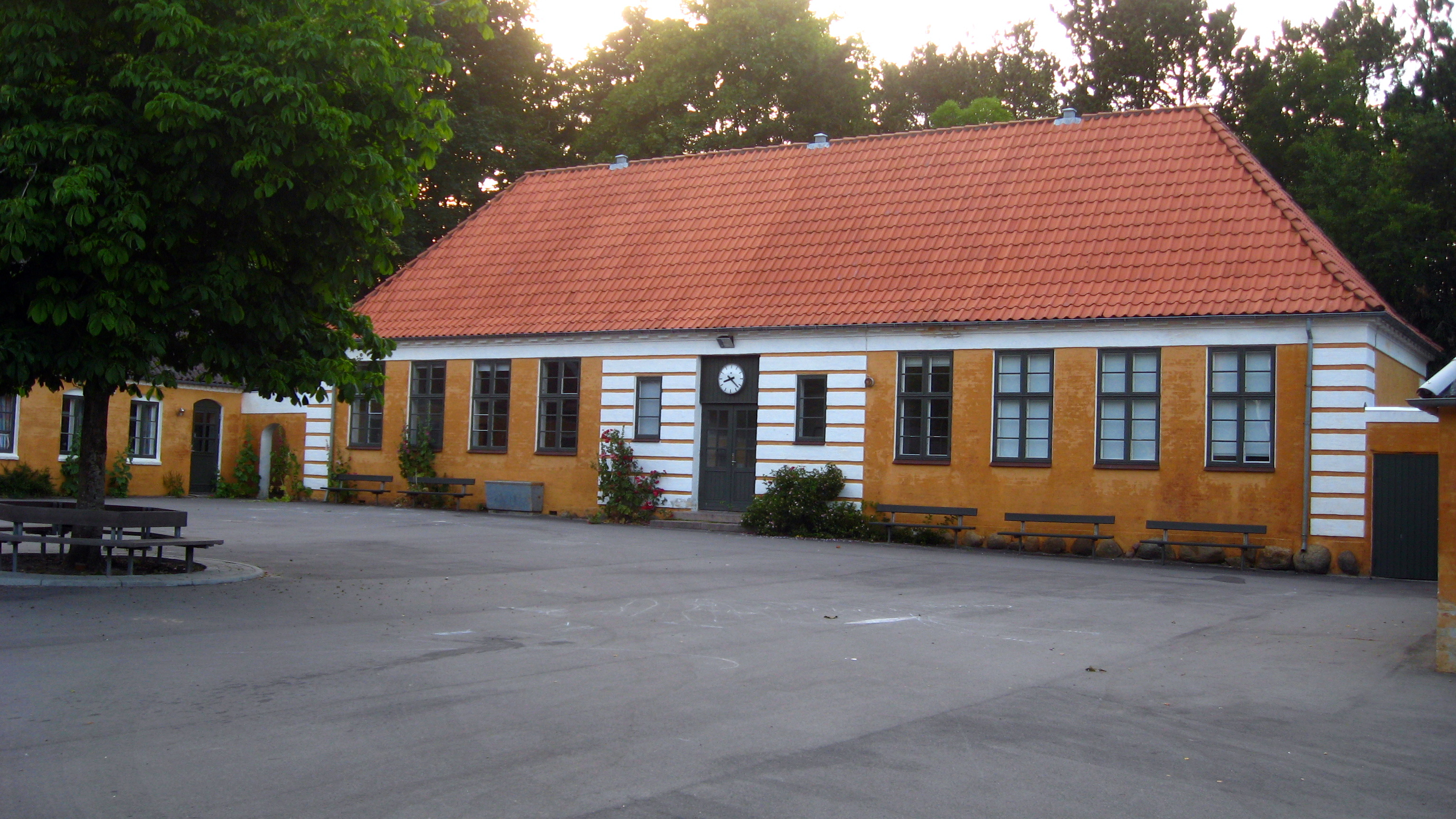 Grindsted skole, Vodskov, Aalborg Kommune